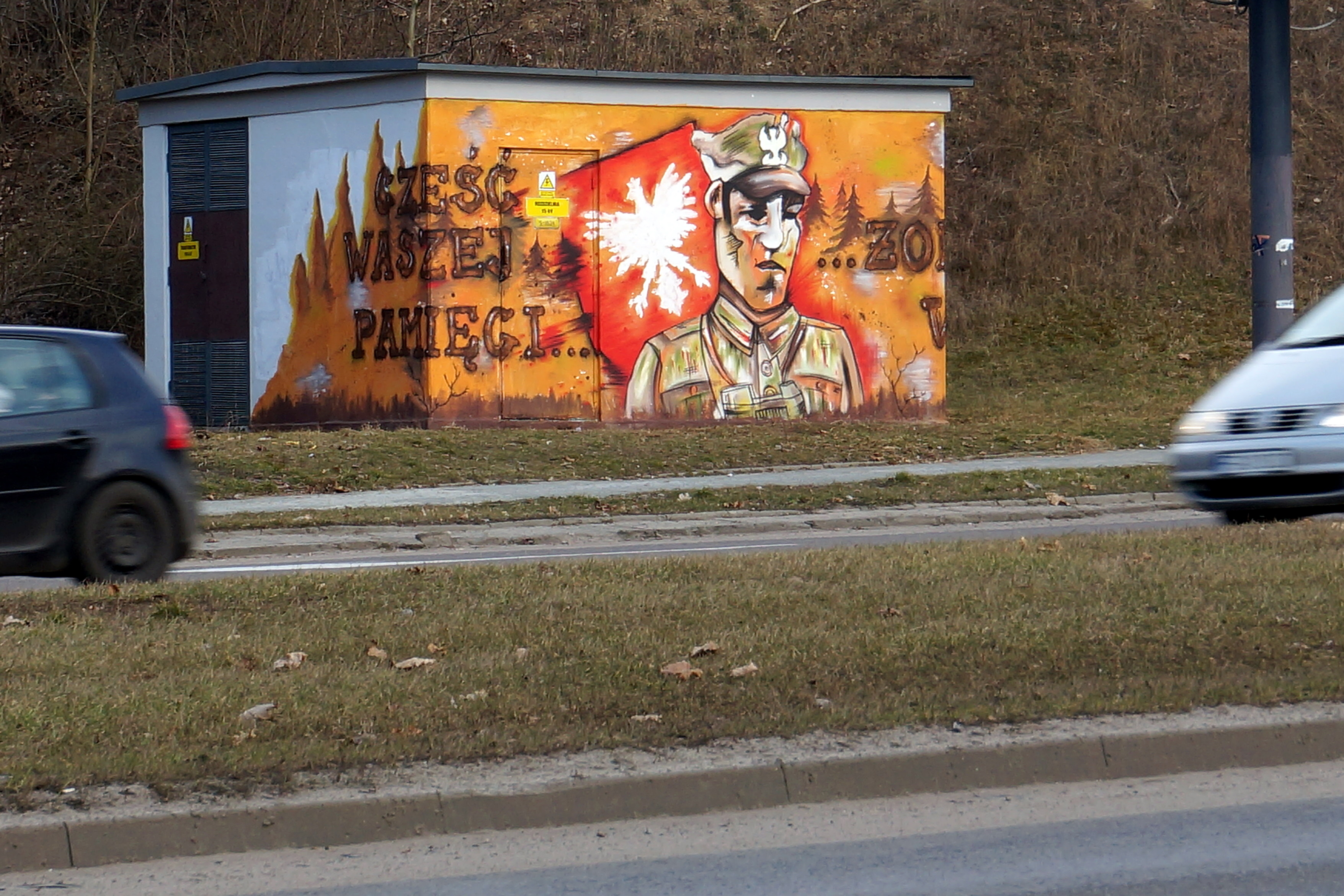 Gorzów Wlkp. Mural upamiętniający "Żołnierzy wyklętych"